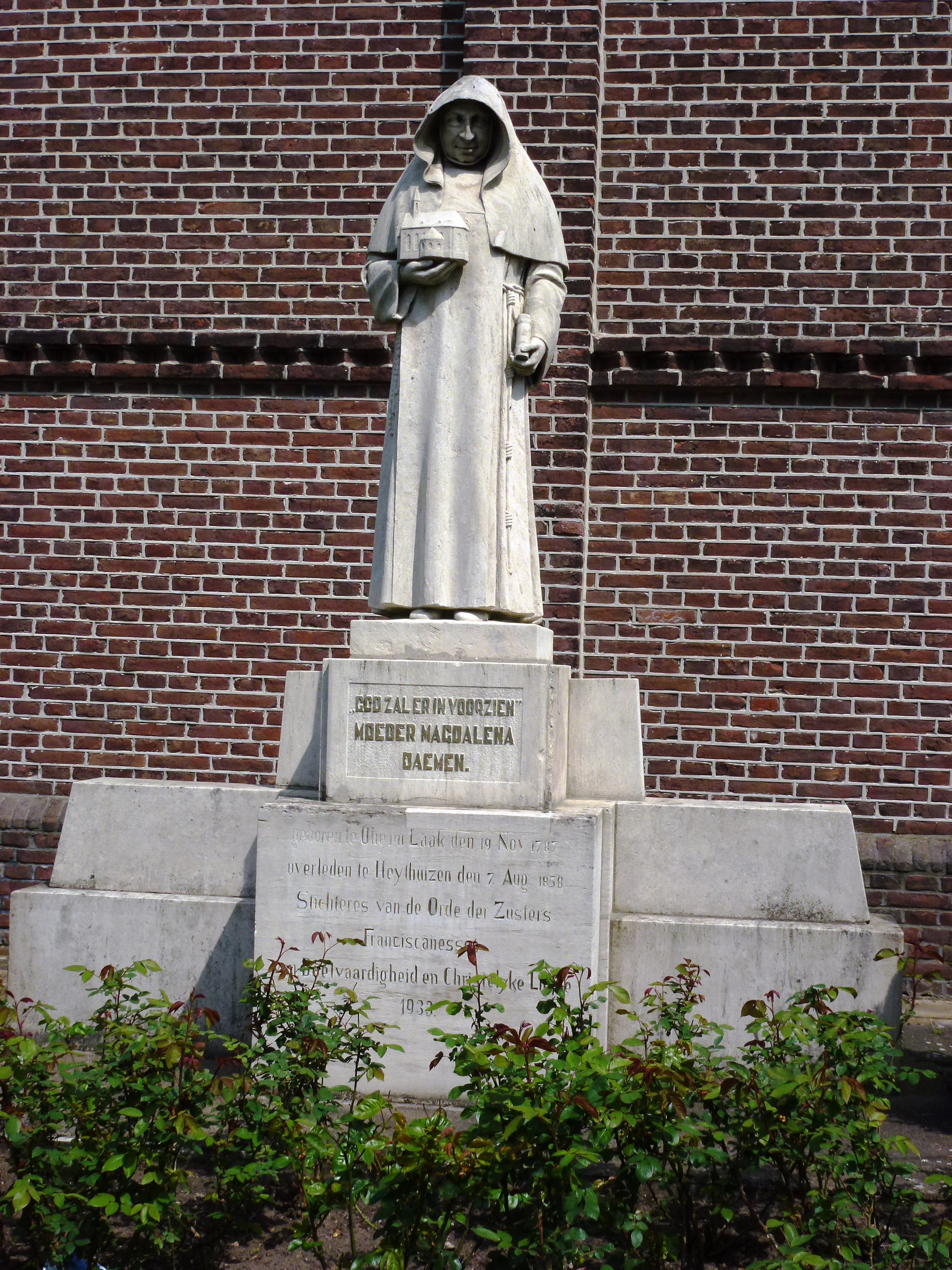 Ohé en Laak (Maasgouw) beeld Moeder Maria Magdalena Daemen